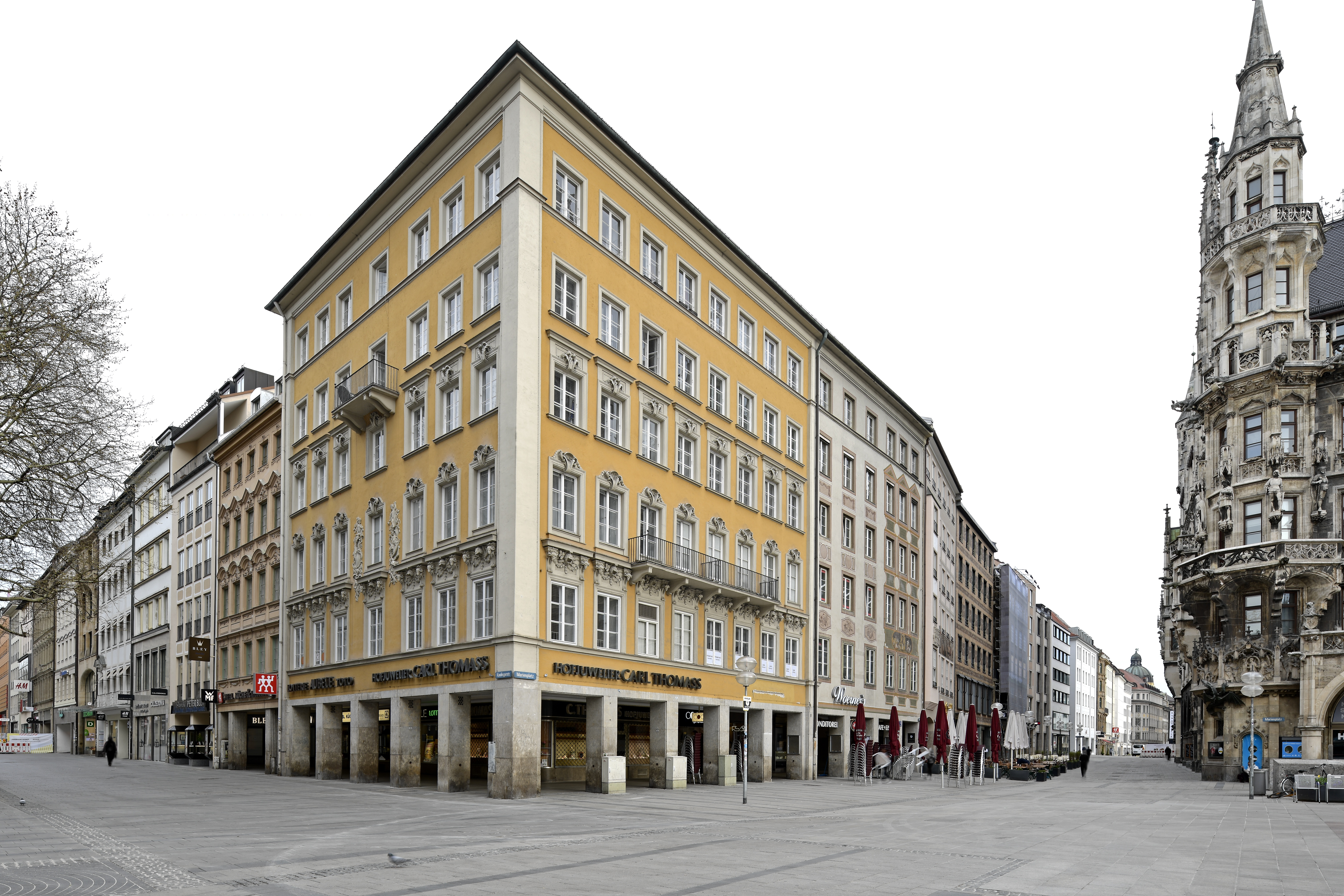 München, Fassadenansicht Marienplatz 1.